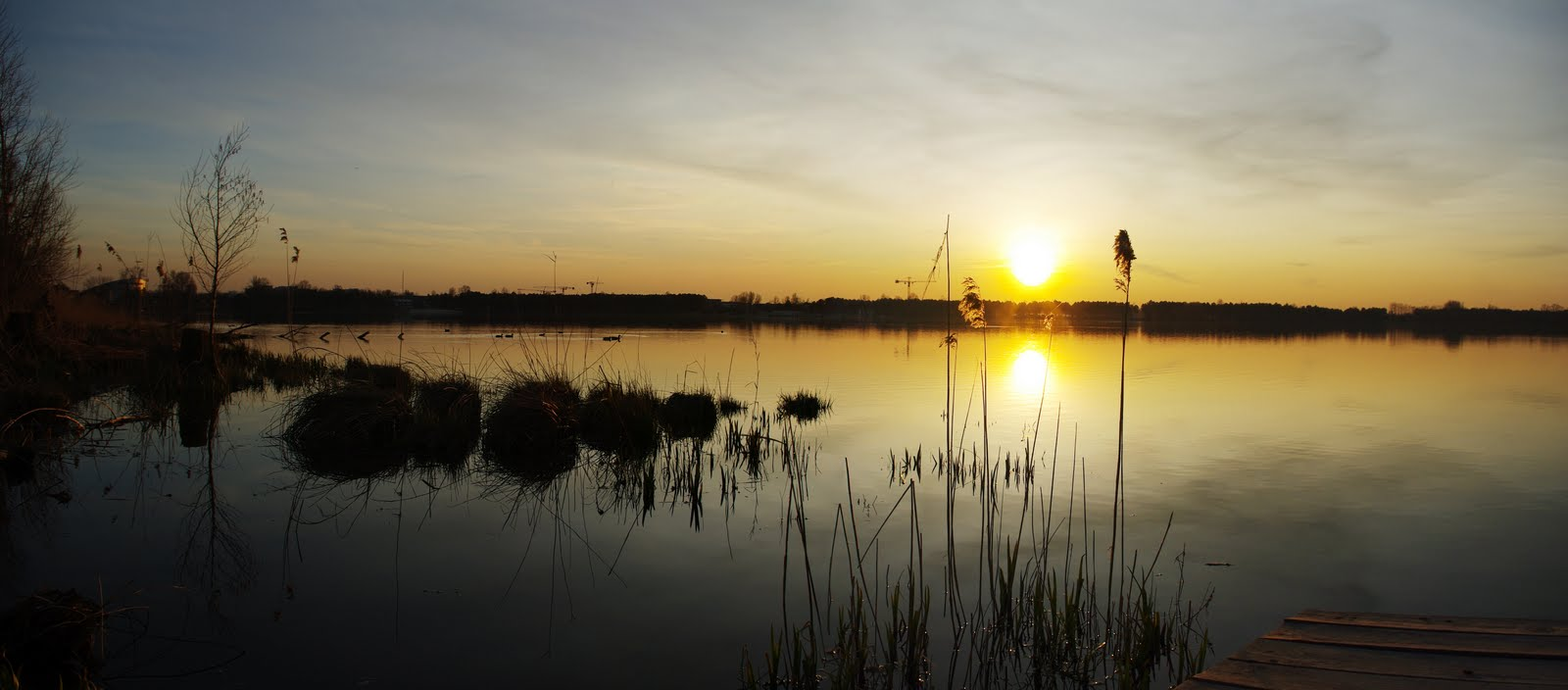 lac de Bordeaux